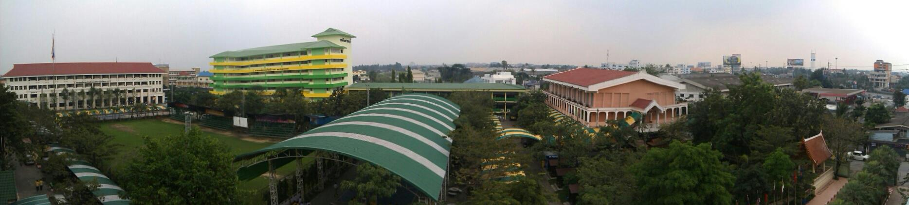 ภาพพาโนรามาโรงเรียนเทพศิรินทร์ นนทบุรี เมื่อมองจากชั้น 5 อาคารอัจฉริยะประสิทธิ์ ถ่ายไว้เมื่อปี พ.ศ. 2555